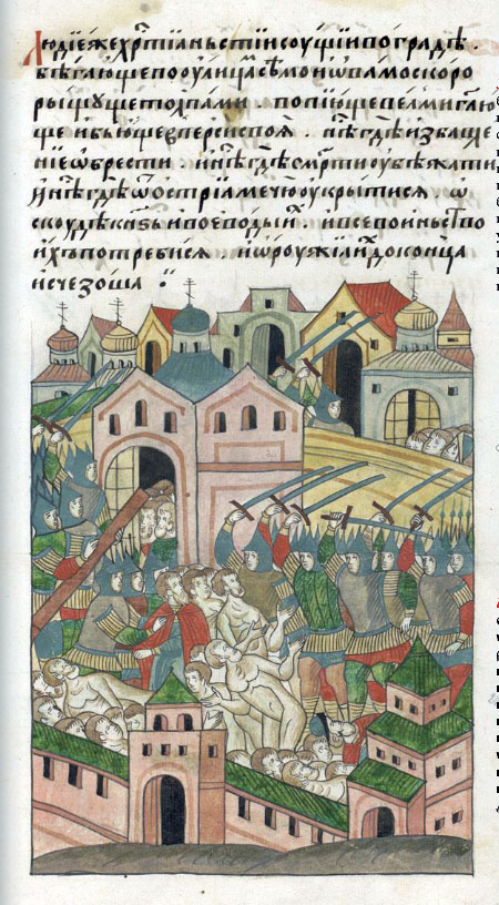 Разорение Москвы Тохтамышем в 1382 году ЛИЦЕВОЙ ЛЕТОПИСНЫЙ СВОД Люди же христианские, бывшие в городе, бегали по улицам туда и сюда, скоро мечась толпами, вопия сильно, крича и бия в грудь свою. Не было, где избавление обрести, и не было, где смерти избежать, и не было, где от острия меча укрыться. Оскудел князь и воеводы их, и все воинство их истребилось, и оружие их до конца исчезло.